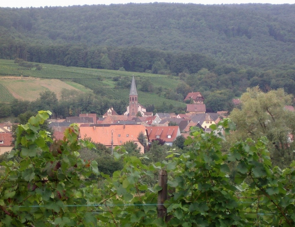 Bergholtz-Zell, Haut-Rhin (France) Author: Rémi Stosskopf Date: 06 September 2006